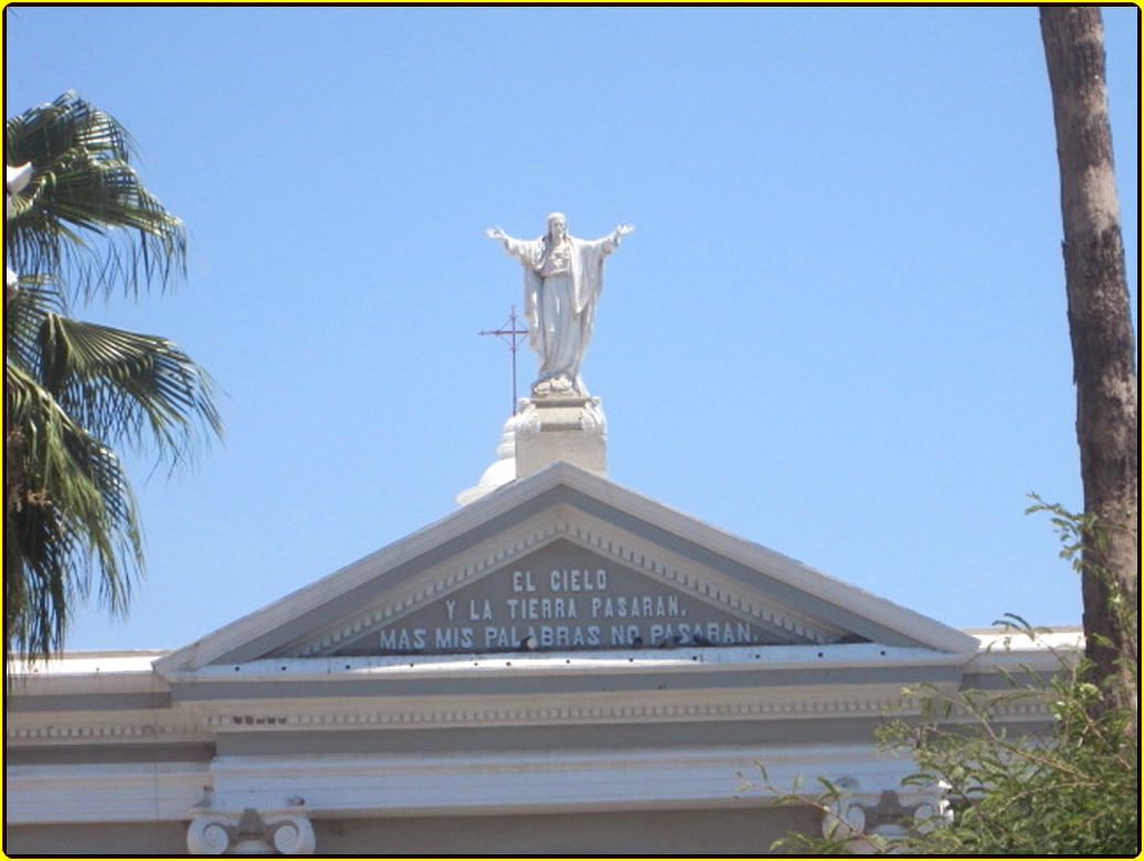 Leyenda en la Parroquia: "El cielo y la tierra pasarán. Mas mis palabras no pasarán".